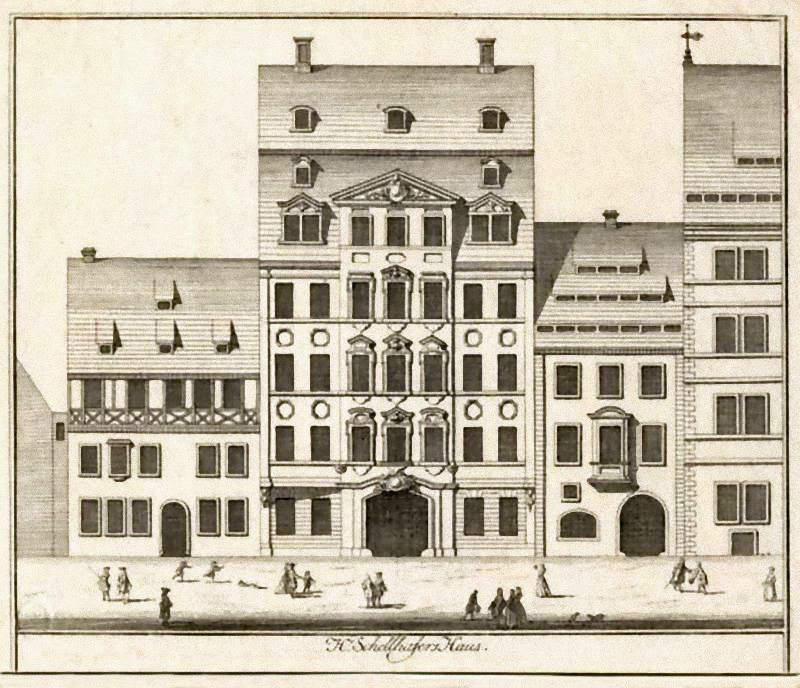 Das Schellhafersche Haus in Leipzig, später Hotel de Saxe